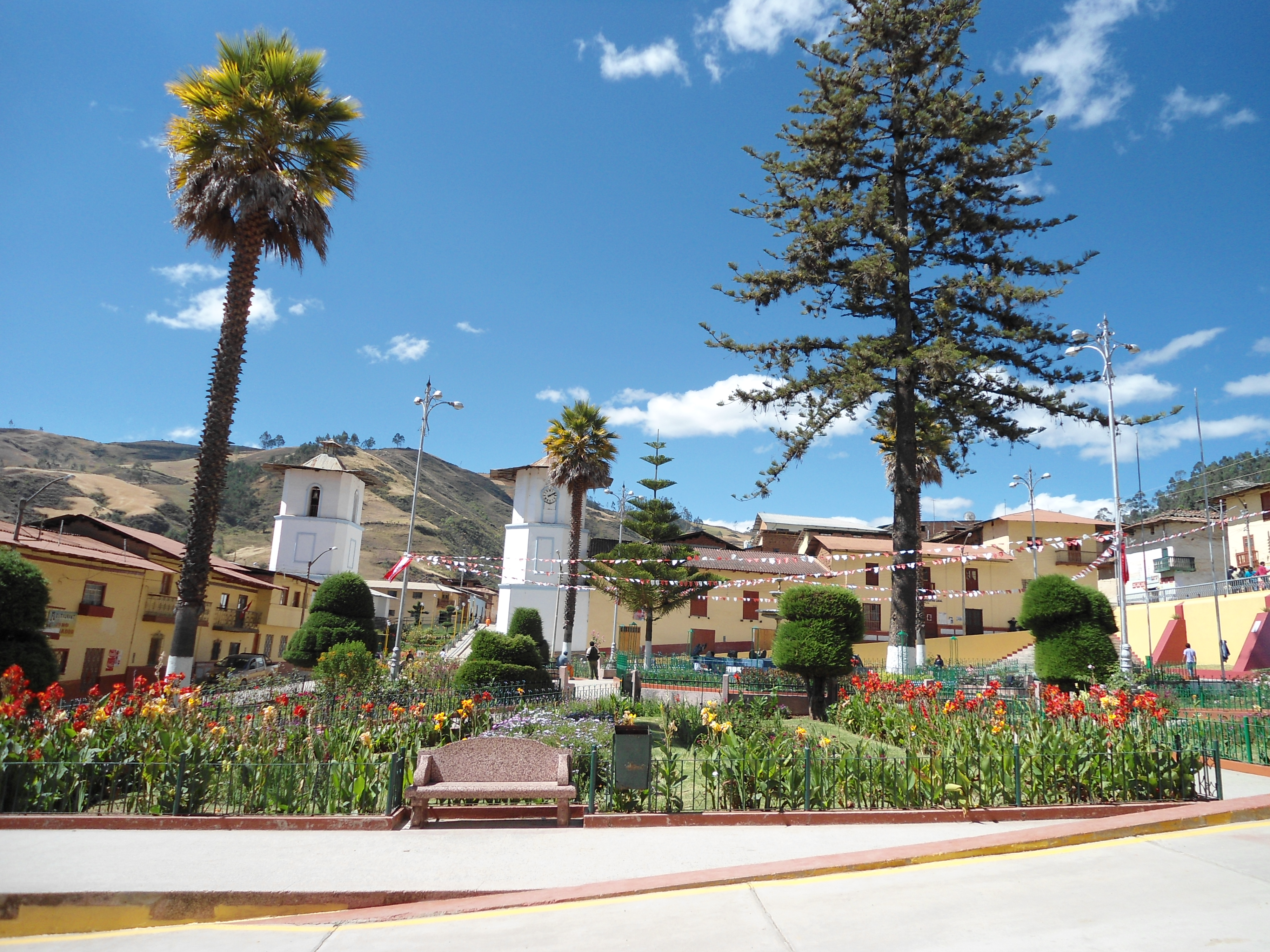 UNA HERMOSA VISTA DE LA CIUDAD DE CONTUMAZA